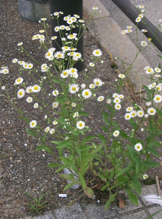 Erigeron annuus